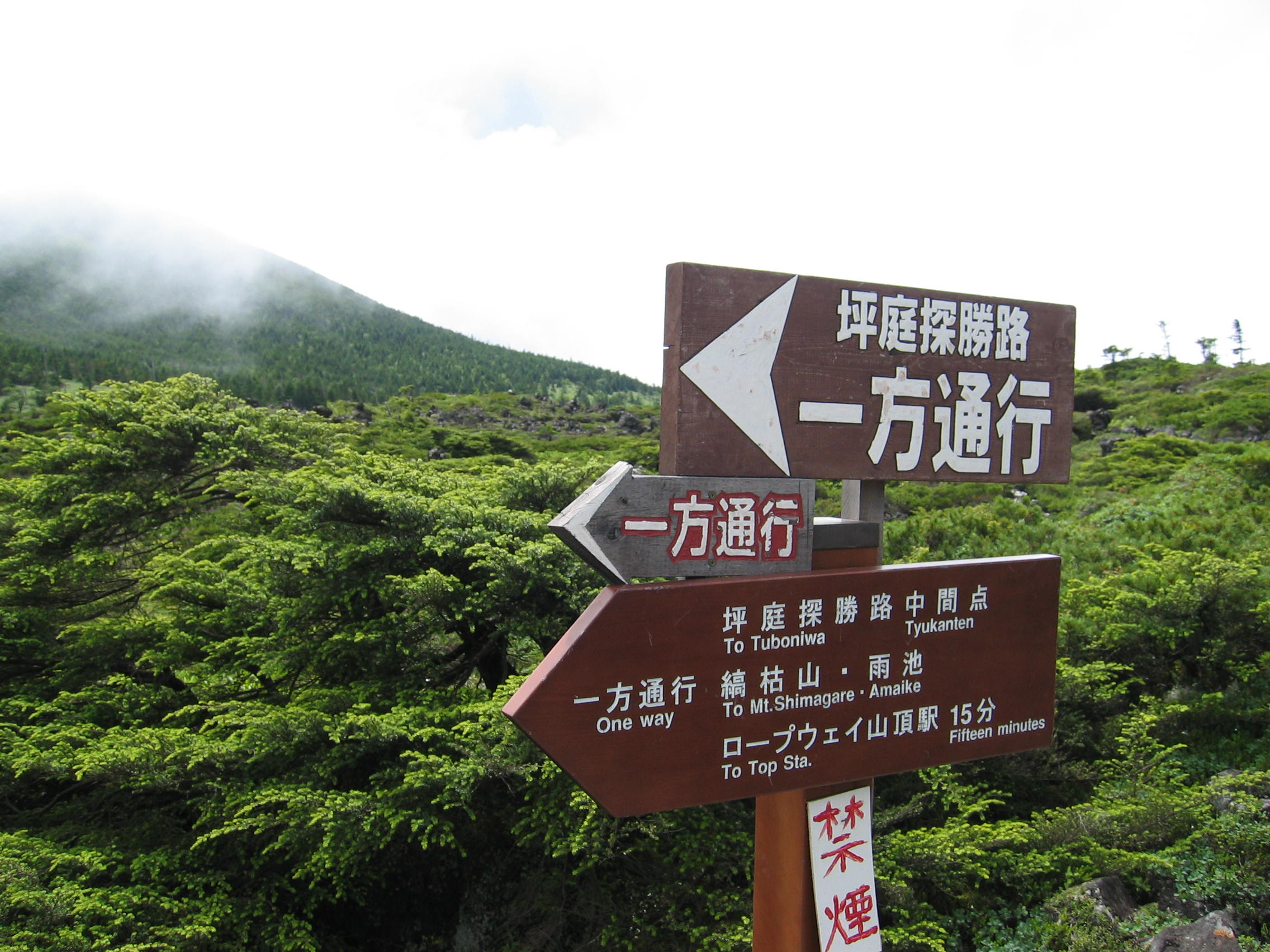 ピラタス蓼科ロープウエイ